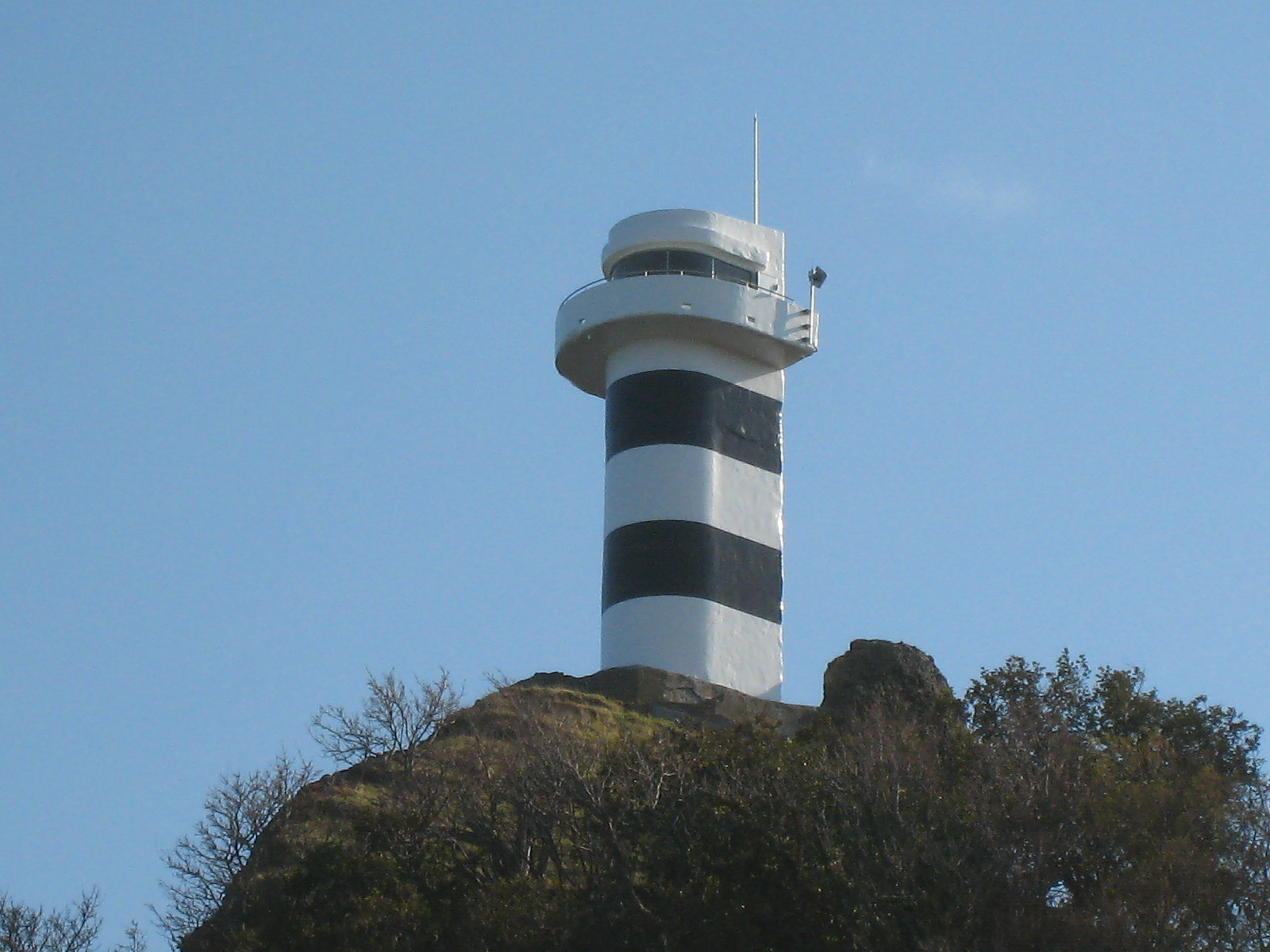 知床岬灯台（近影）